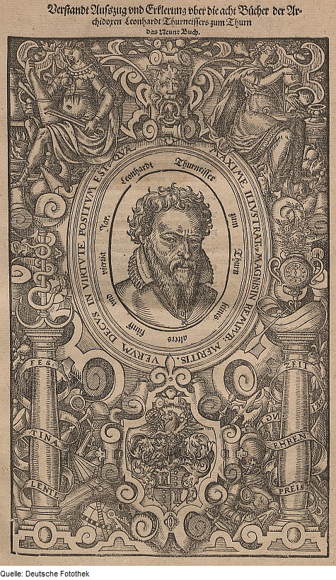 Original image description from the Deutsche Fotothek Porträt & Mineralogie & Medizin & Chemie & Alchemie & Mineralogie & Wappen & Allegorie